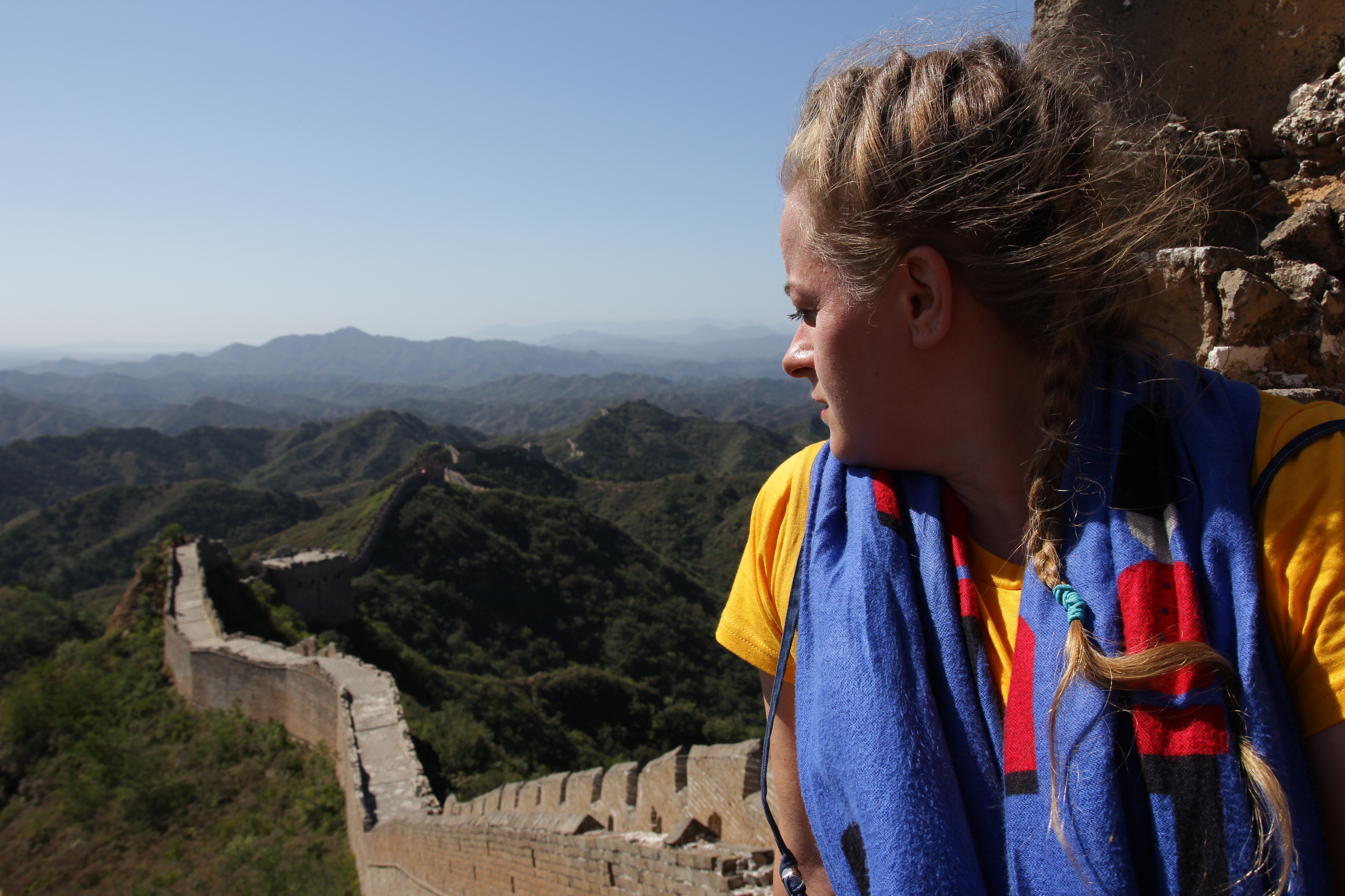 Antonija Putić na Kineskom zidu, 2015.